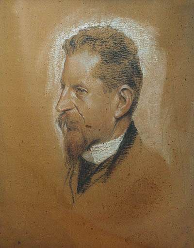 Portrait de l'écrivain allemand Carl Hauptmann Source : Wikipédia germanophone